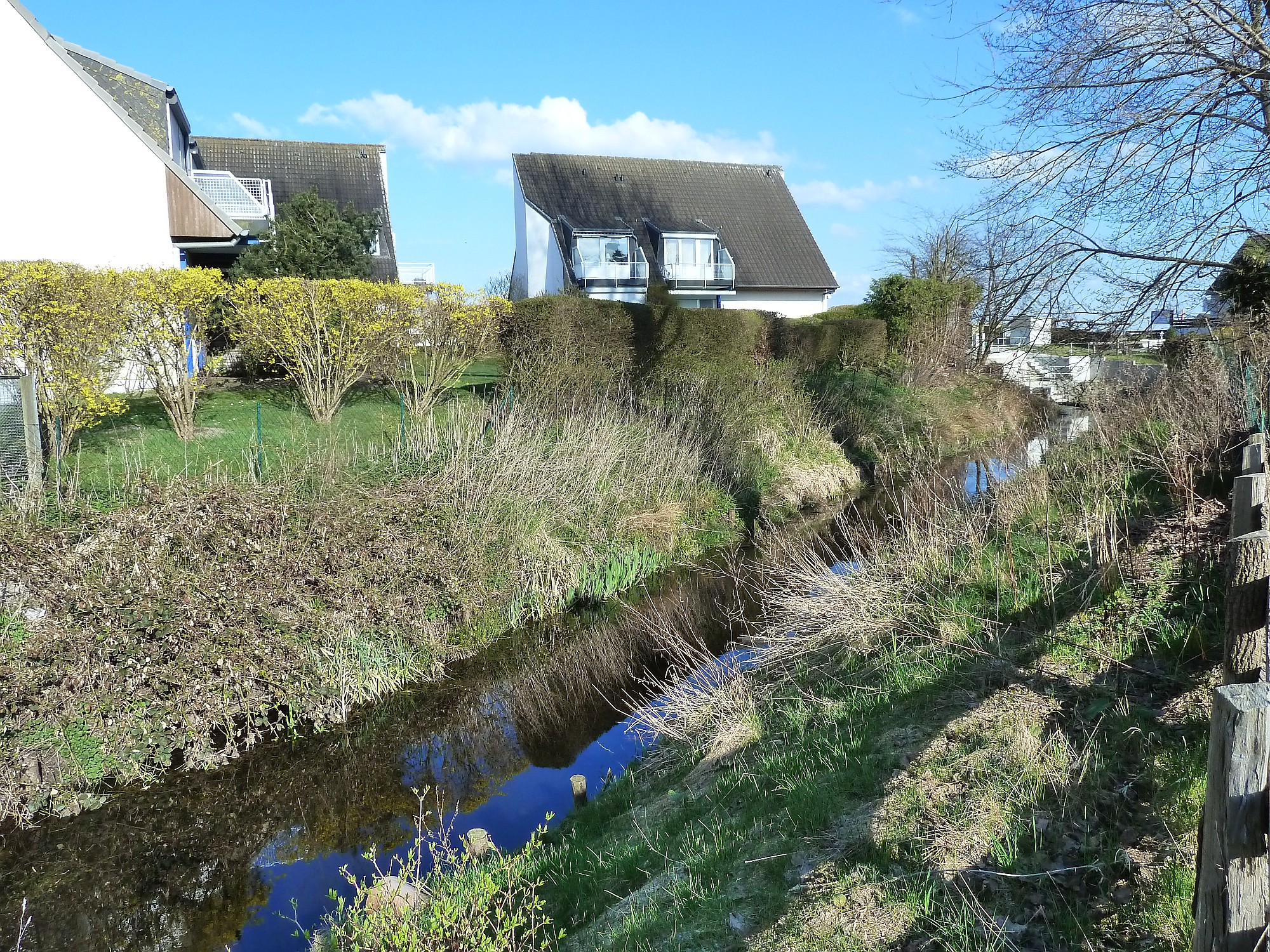 Die Göschbek (Gösebek) kurz vor der Einmündung in die Ostsee